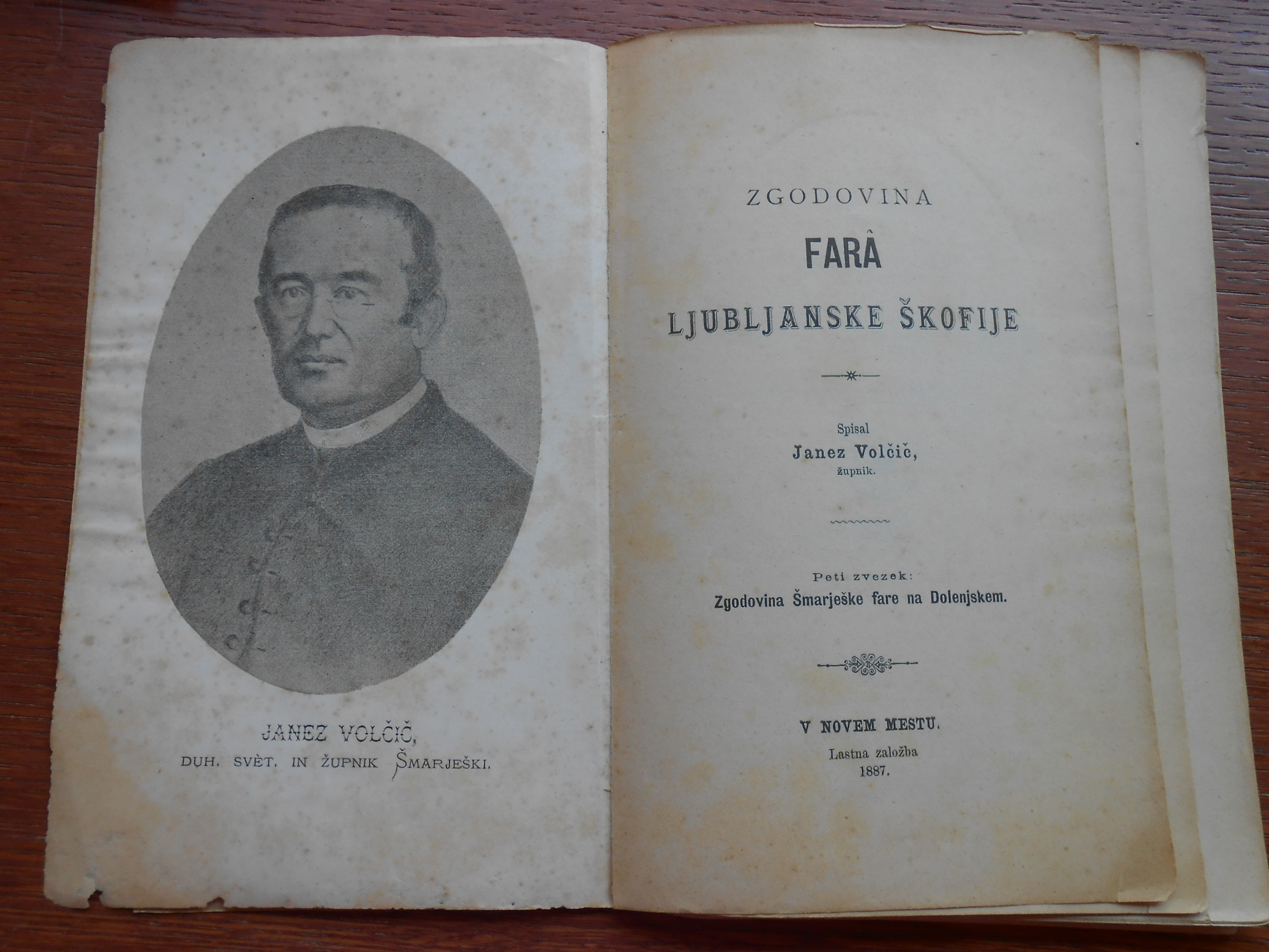 Zgodovina šmarješke fare